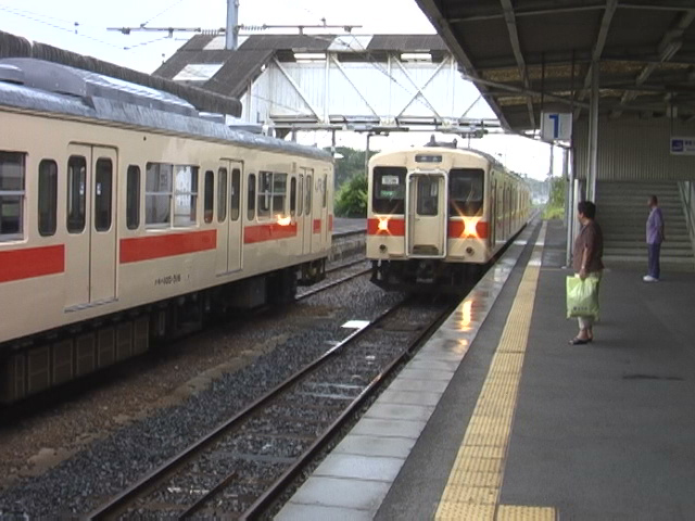 投稿者自身がJRja:和歌山線の車両を同路線の某駅ホームで撮影。 2006年8月27日（日）撮影 機材：某メーカー製デジタルスチルカメラ 撮影者：阪神強いな category:鉄道列車画像